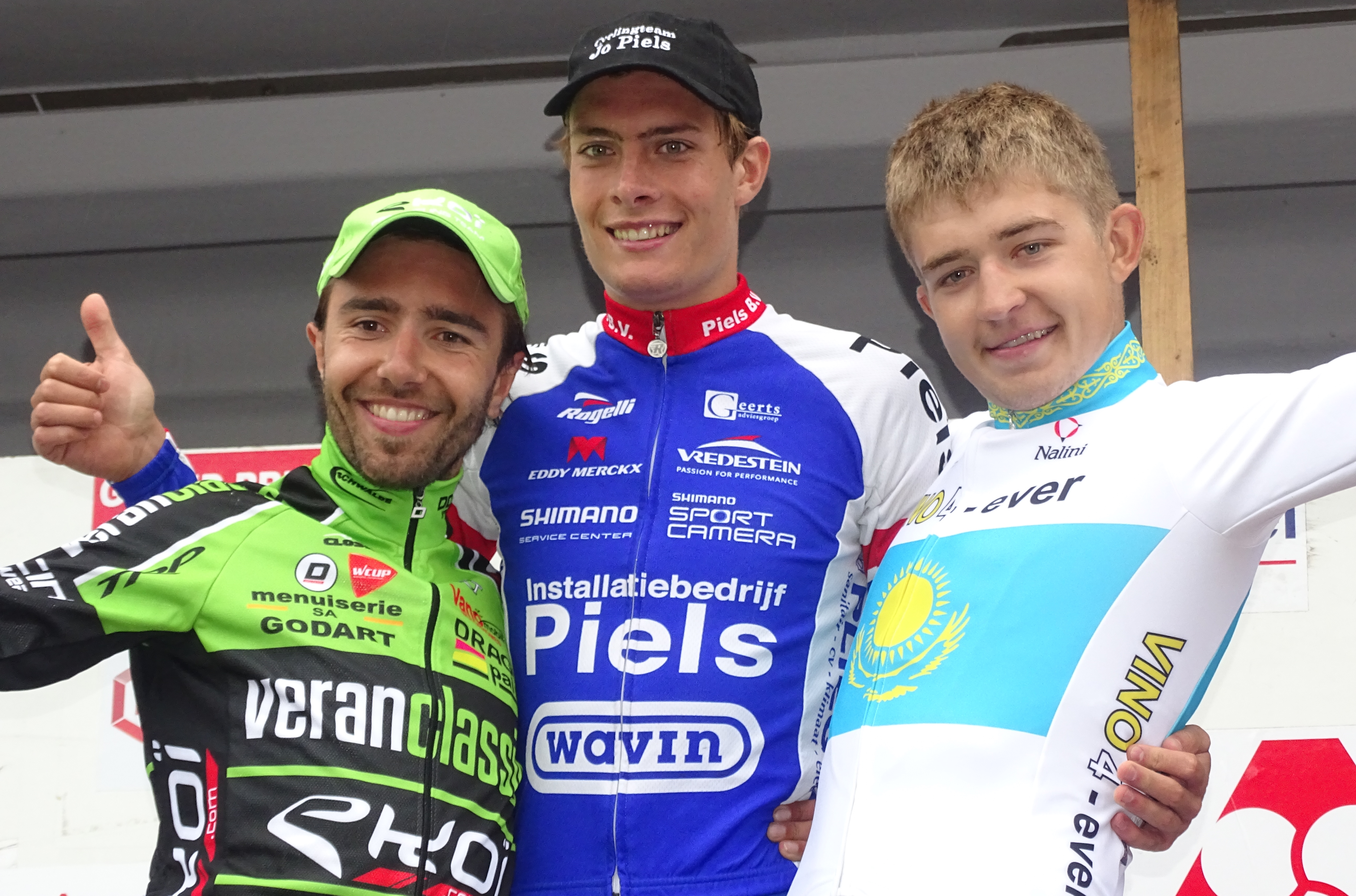 Reportage réalisé le mardi 25 août à l'occasion du départ et de l'arrivée du Grand Prix des Marbriers 2015 à Bellignies, Nord-Pas-de-Calais, France.